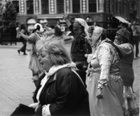 Chiquet Mawet lors d'une action du collectif Chômeurs pas Chien ! - Alternative Libertaire (Belgique).